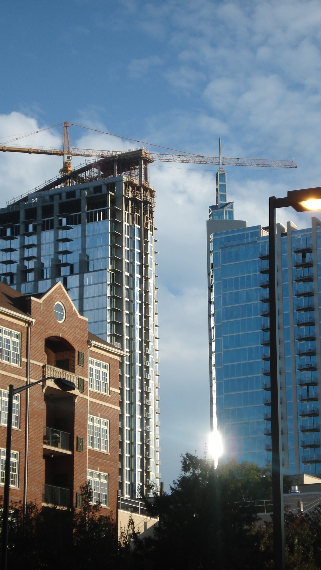 Atlanta development